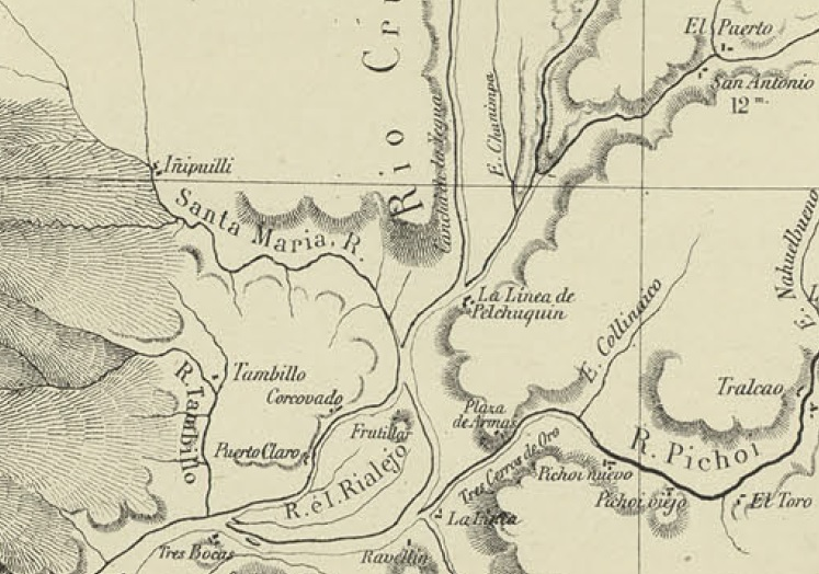 Iñipulli y Pelchuquín en el Mapa de la Expedicion de Francisco Vidal Gormaz, Continuación de los trabajos de esploración del Río Valdivia i sus afluentes de 1869